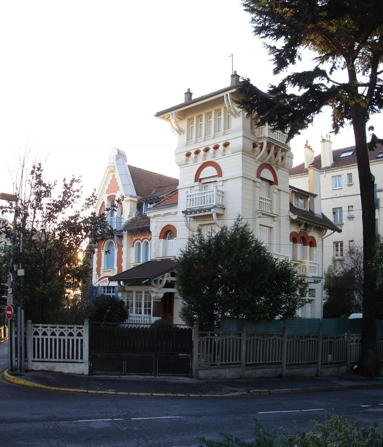 La villa « Mon rêve » - Enghien-les-Bains (France)